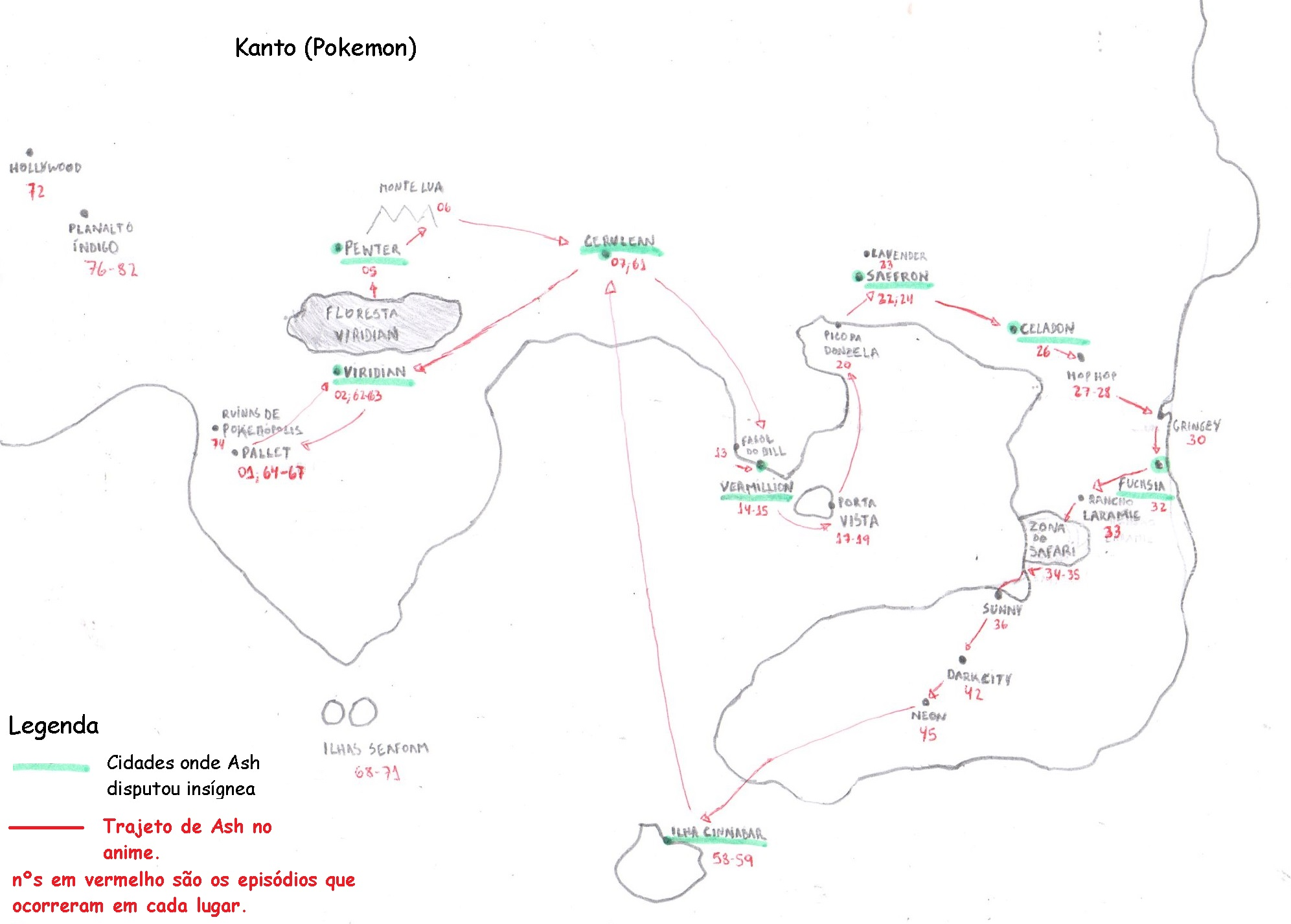 Mapa de Kanto no Anime Pokemon.